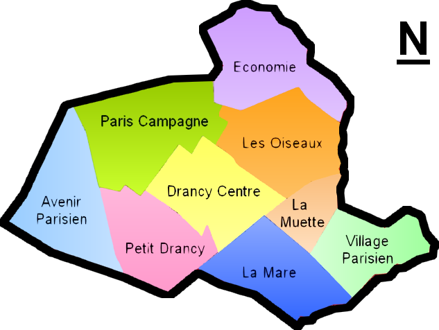 Plan des différents quartiers de Drancy